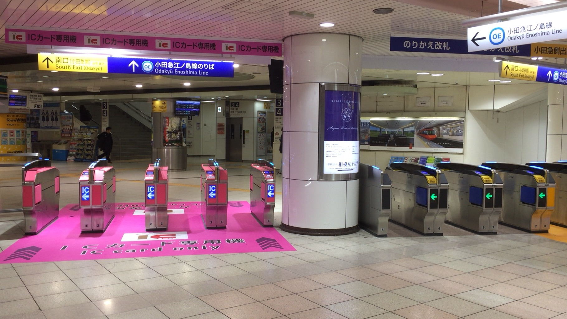 2018年3月に設置された大和駅の相鉄線〜小田急線乗り換え自動改札機。